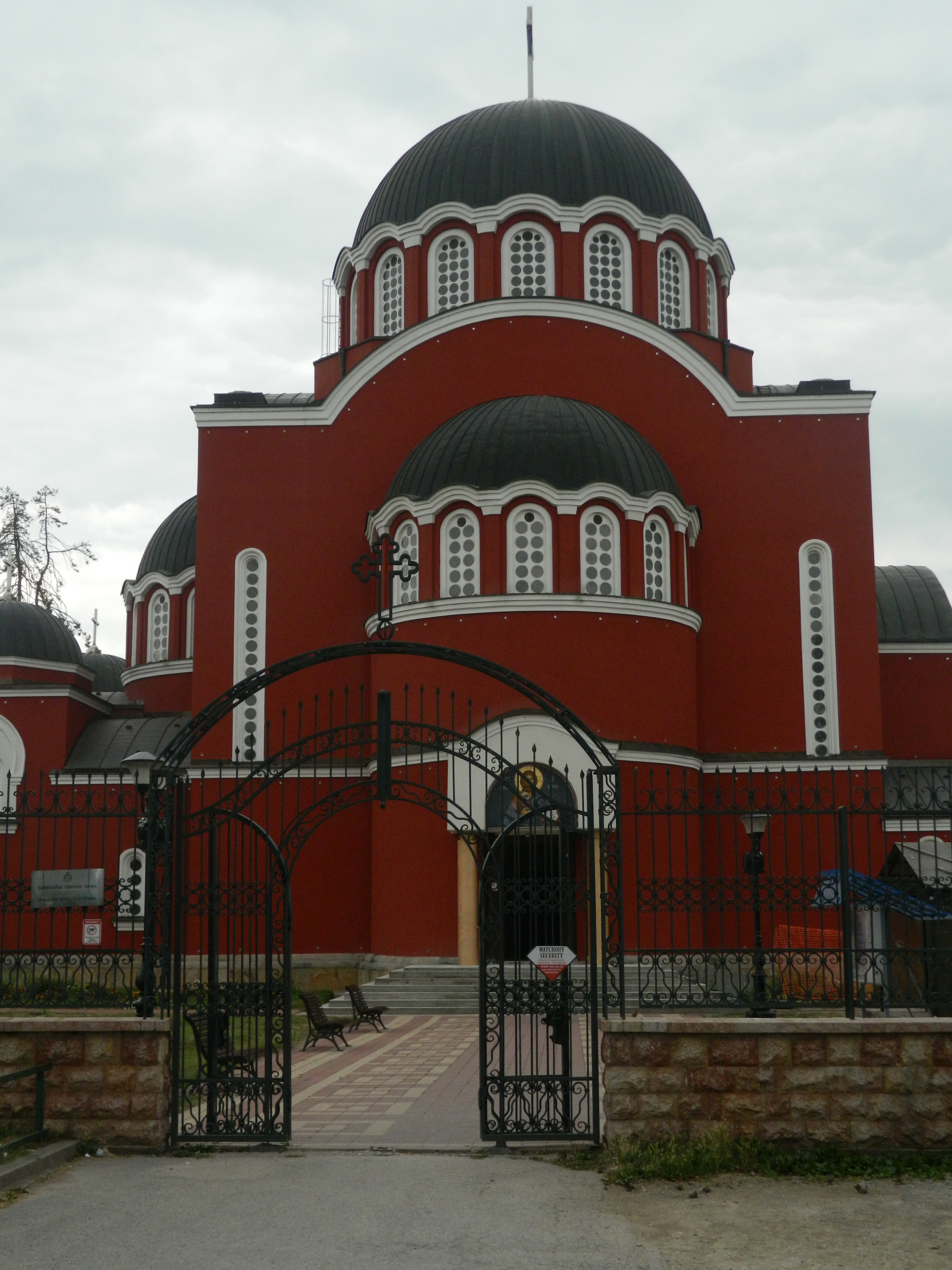 Spoljašnjost hrama Svetog Save u Kraljevu.